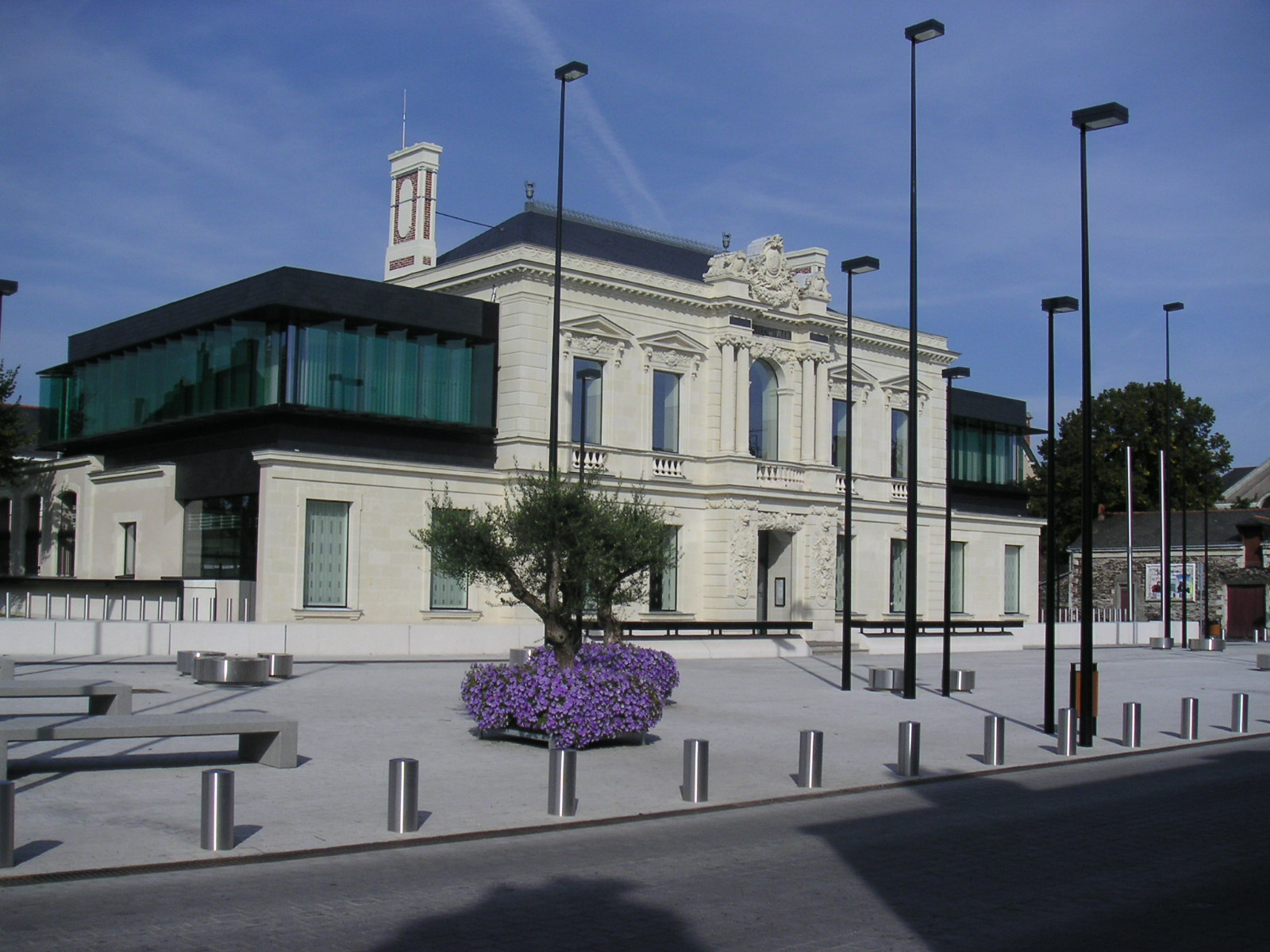 Mairie de Trélazé